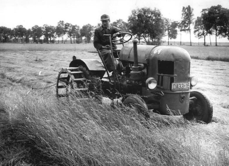 Rogäsen, Heuernte, Mähmaschine Zentralbild Weiß Wei-Sch. 30.6.1956. Heuernte im Fiener Bruch, Bez. Potsdam UBz: Traktorist Bäwert von der MTS Ziesar, Stützpunkt Rogäsen , bei der Heumahd.